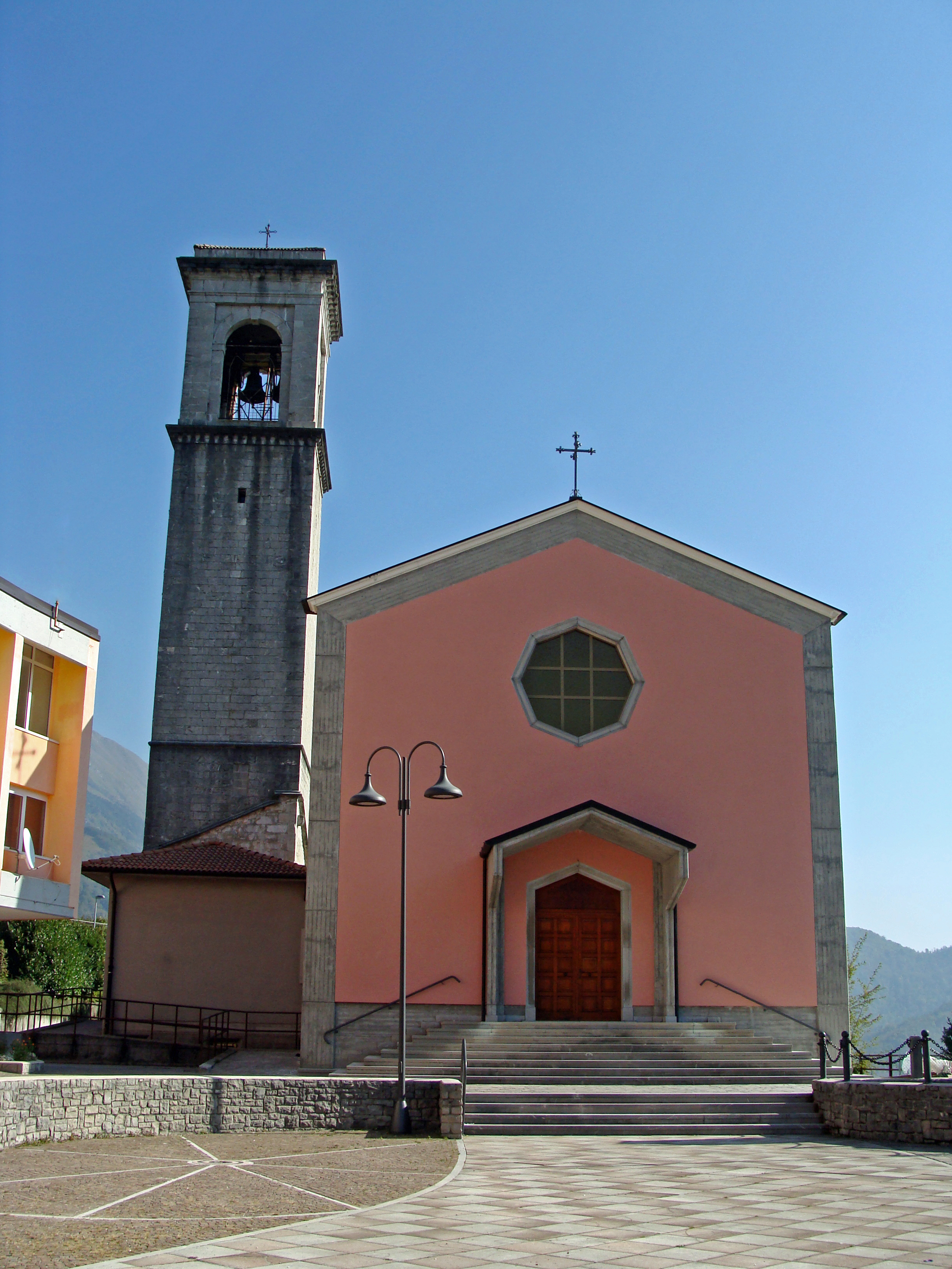 Monteaperta chiesa San Michele